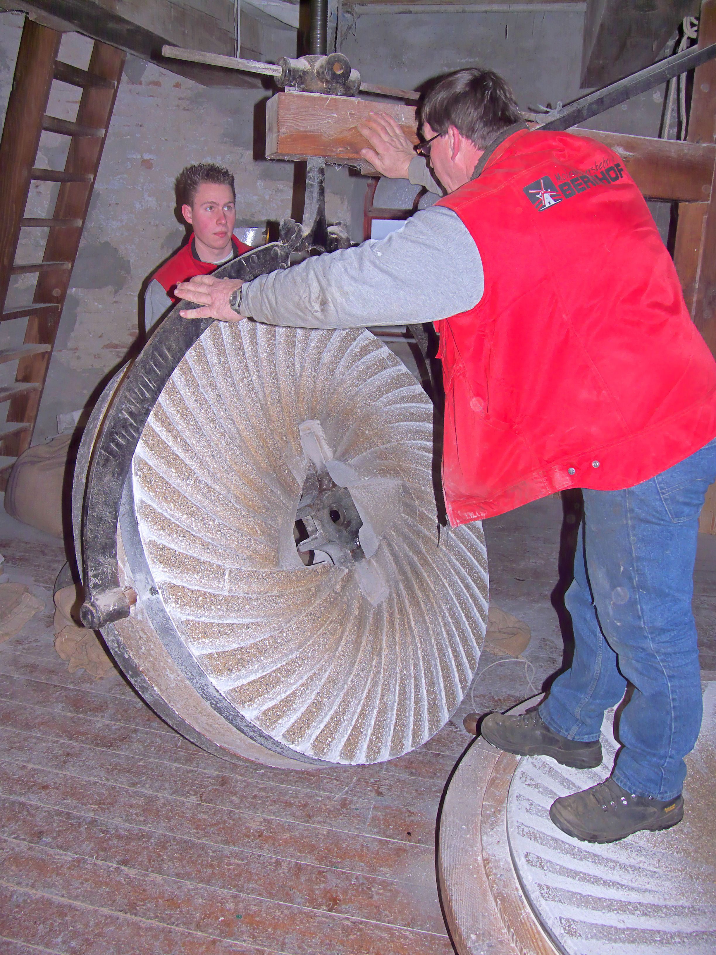 Molen De Hoop, Garderen, koekensteen voor het vermalen van lijnkoeken